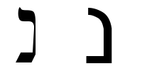 hebrew letter nun